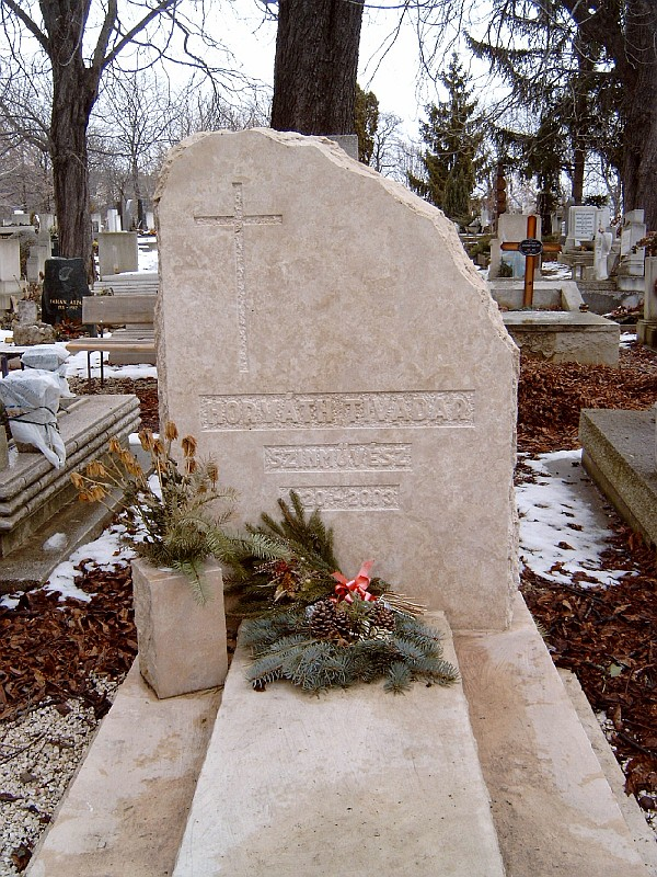 Horváth Tivadar (Budapest, 1920. március 19. – Leányfalu, 2003. április 30.) színész, rendező sírja Budapesten. Farkasréti temető: 25-10-71.